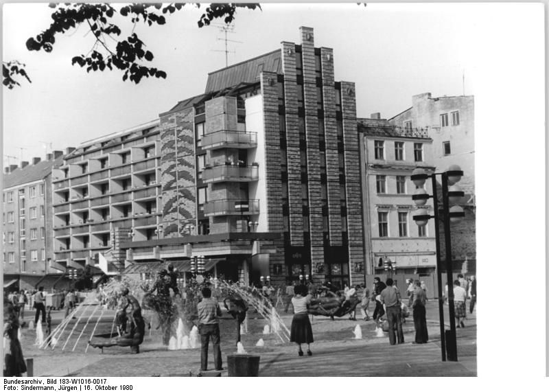 ADN-ZB / Sindermann / 16.10.1980 / Rostock: Schöne DDR Der Rostocker Bildhauer Reinhard Dietrich arbeitete mit seinem Kollegen Jo Jastram an der Gestaltung des "Brunnens der Lebensfreude" auf dem Universitätsplatz. Auch an dem Giebelhaus (Hintergrund), das sich harmonisch in die historischen Bauten der Kröpeliner Straße einordnet, ist Reinhard Dietrich beteiligt. Der Experimentalbau entstand nach einem Entwurf des Architektenkollektivs um Peter Baumbach und Erich Kaufmann. Der Bildhauer schuf die Keramik-Reliefs. (siehe auch 16N)